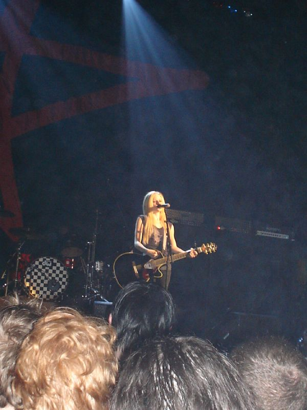 Avril em São Paulo, Brasil em 2005